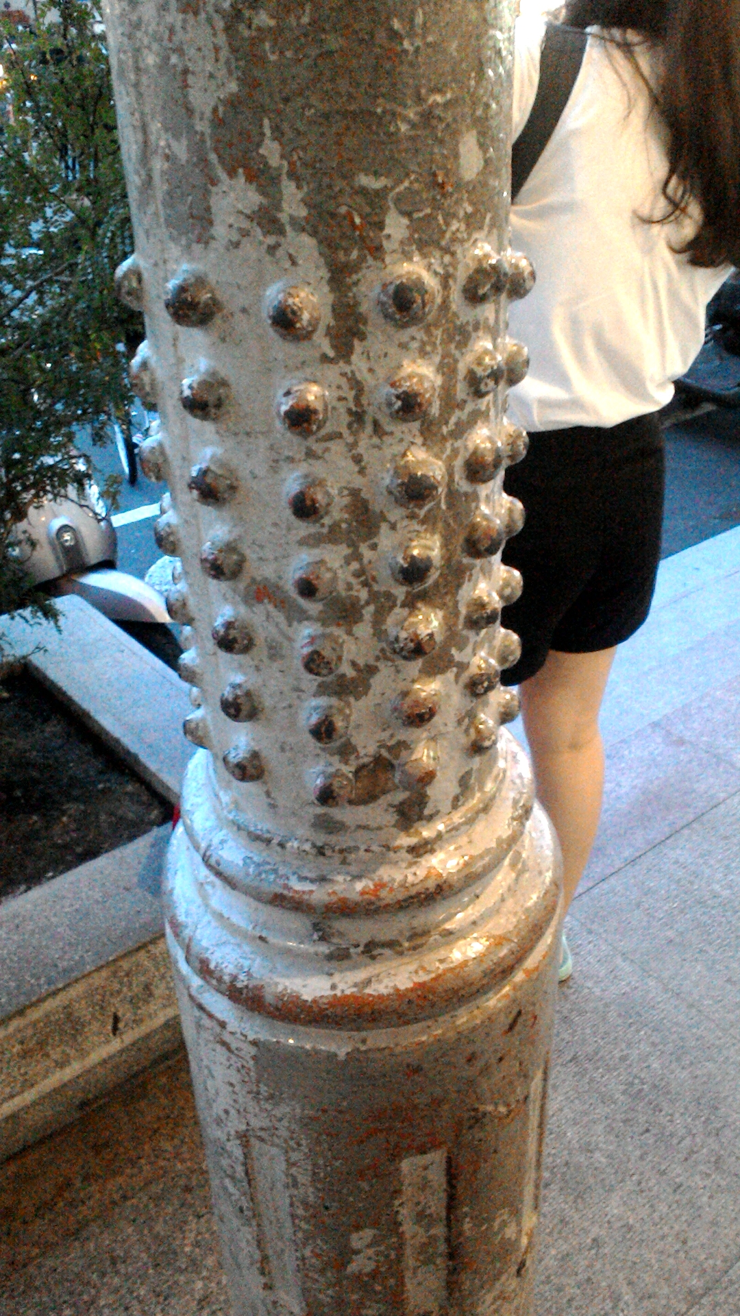 台鐵新竹車站鐵柱乳丁,台灣省新竹市東區東門聯里榮光里